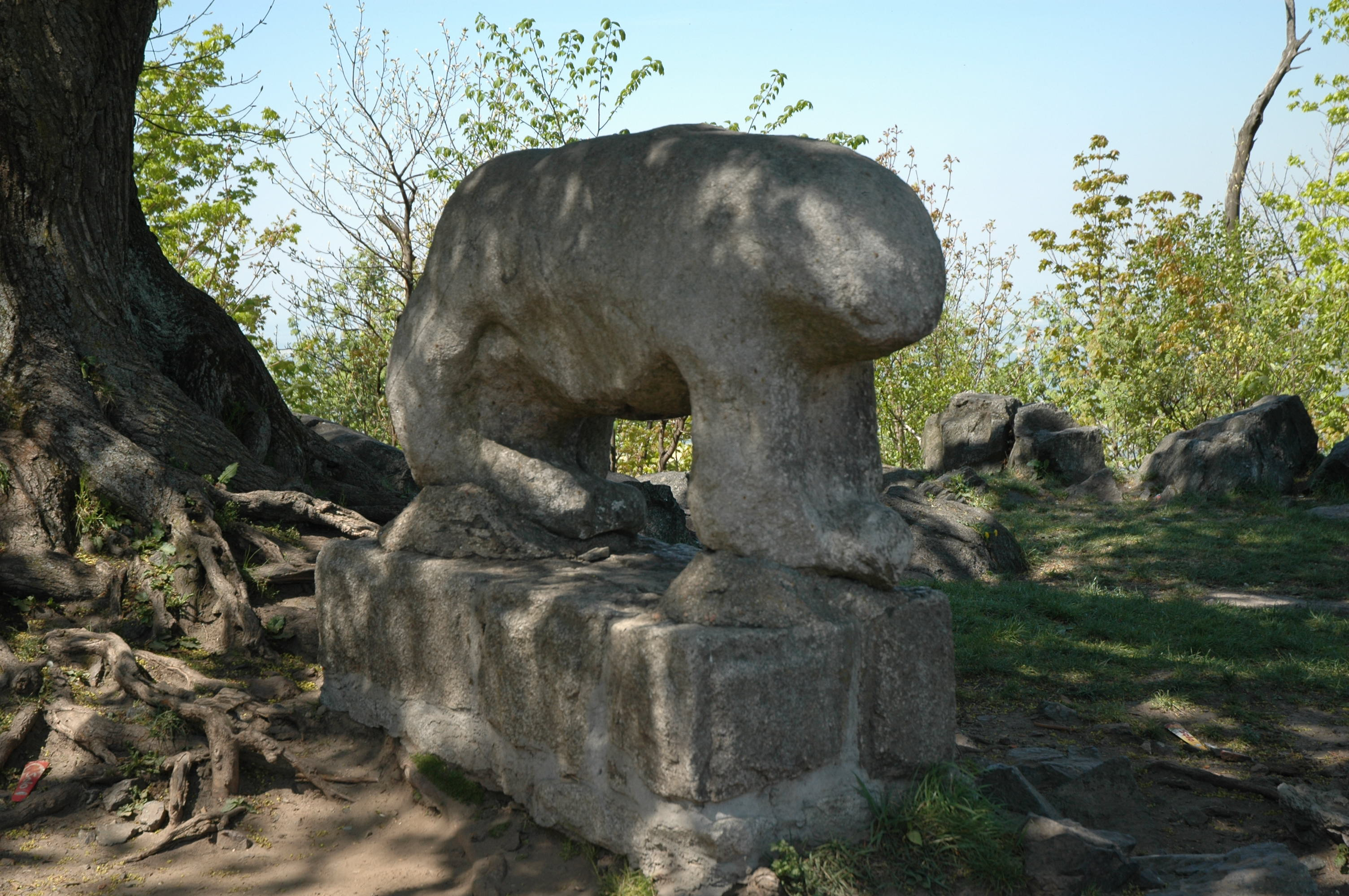 Poland, mount Sleza - ancient cult figure.